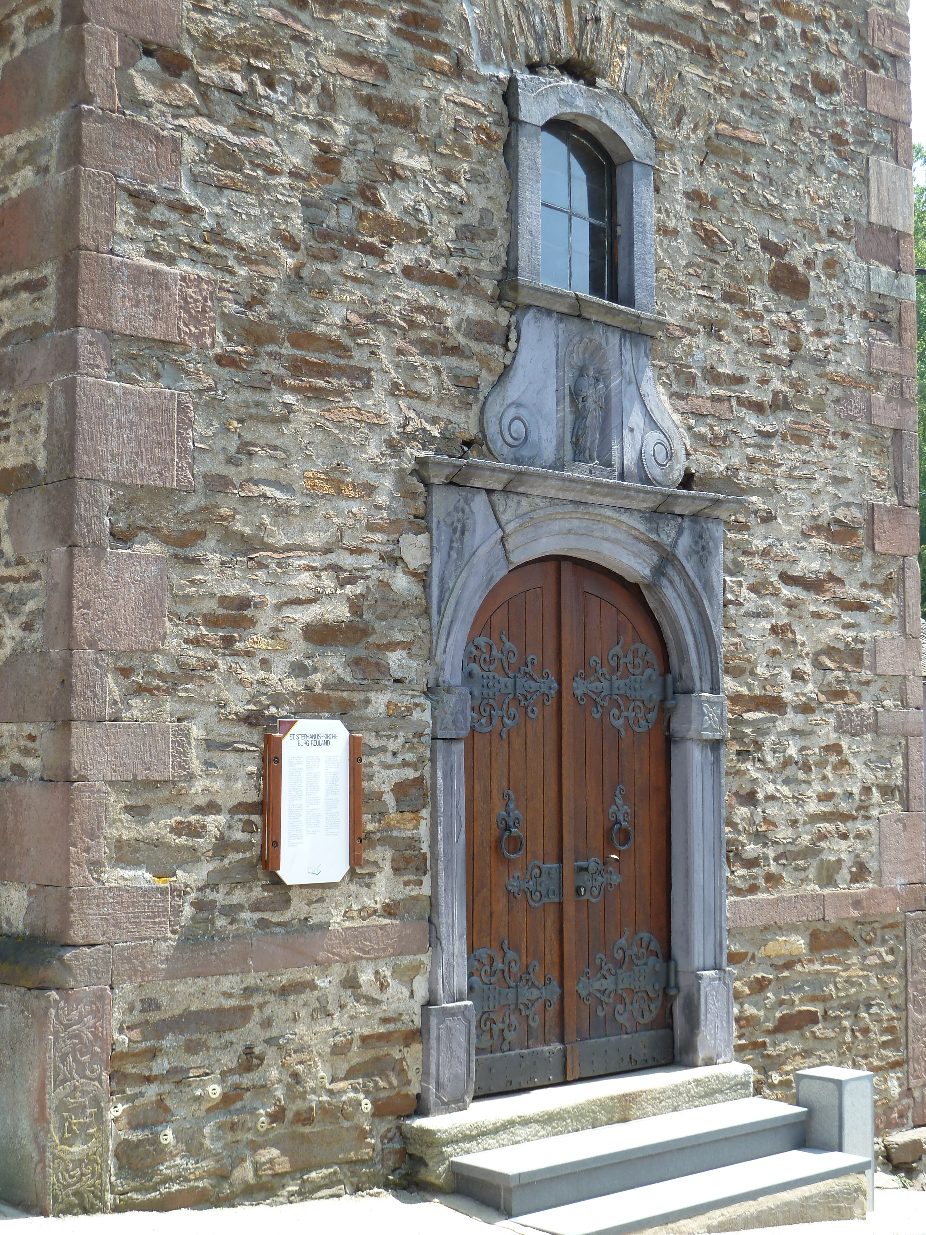 St Stephanuskerk, Burg-Reuland, Belgique